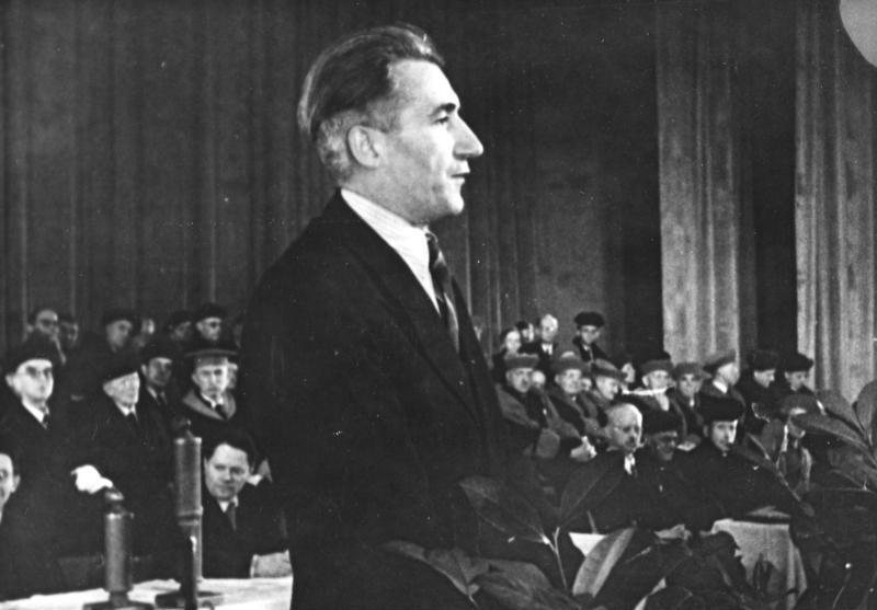 Berlin, Eröffnung der Humboldt-Universität ADN-ZB/Archiv 1946: Eröffnung der Berliner Universität Paul Wandel, Präsident der Zentralverwaltung für Volksbildung der Sowjetischen Besatzungszone Deutschland, spricht am 29. Juli anläßlich der Wiedereröffnung der Berliner Universität. (Sie erhielt 1949 den Namen "Humboldt-Universität".) 201-46/Cürlis [Berlin.- Eröffnung der Humboldt-Universität, Ansprache durch Paul Wandel,] Abgebildete Personen: Wandel, Paul Dr.: Minister für Volksbildung, stellvertretender Minister für Auswärtige Angelegenheiten, Präsident der Liga für Völkerfreundschaft, SED, DDR (PND 11713662X)